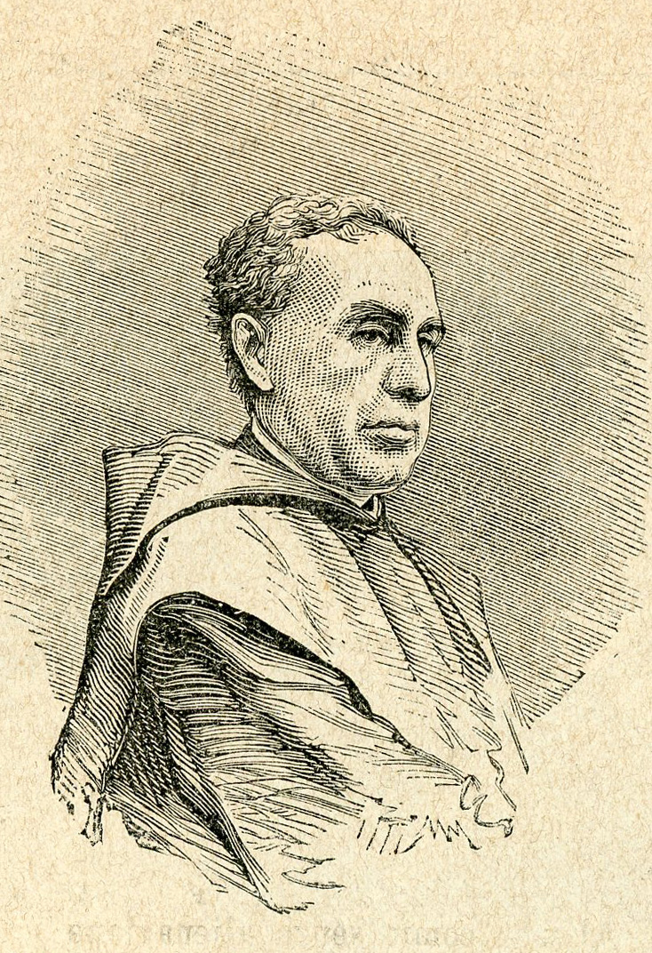 Il Padre Luigi Tosti, archivista di Montecassino (xilografia).